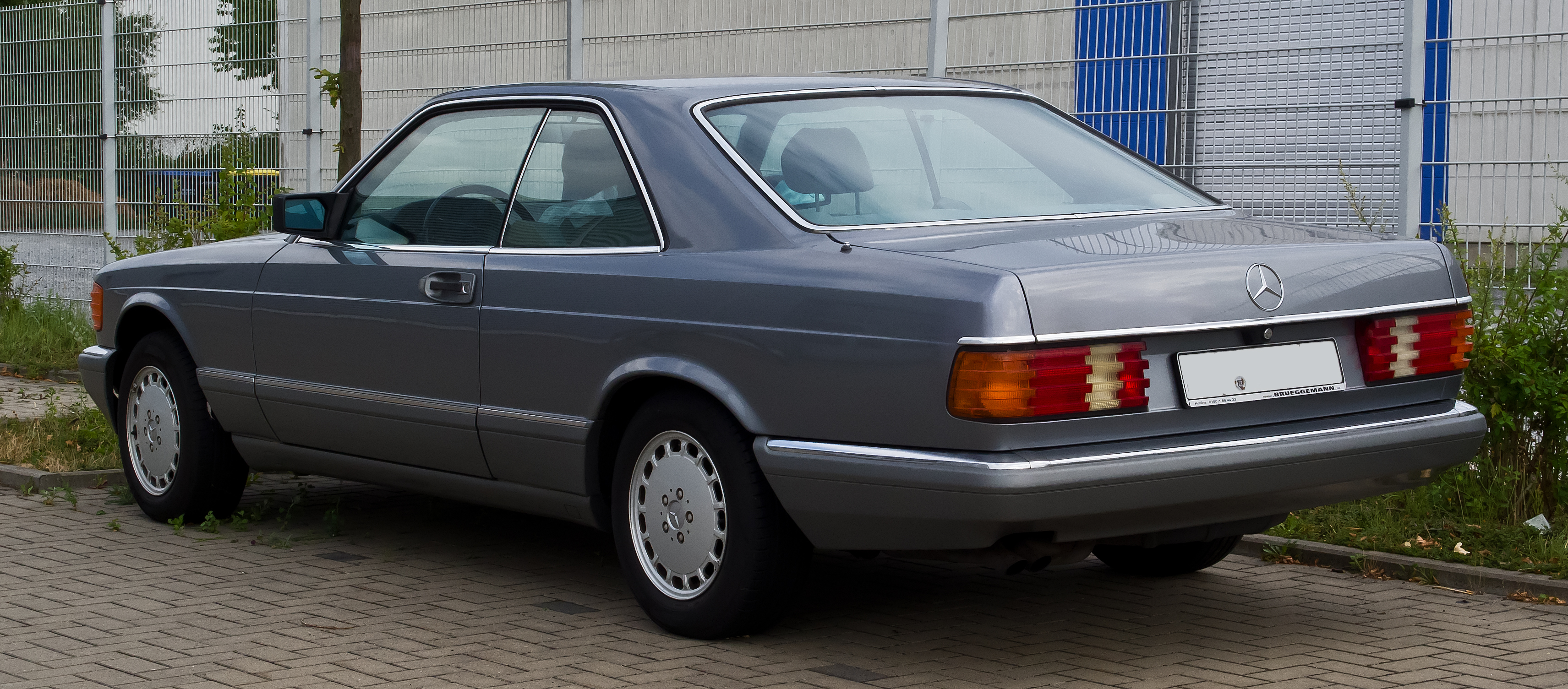 Mercedes-Benz 500 SEC (C 126, Facelift)